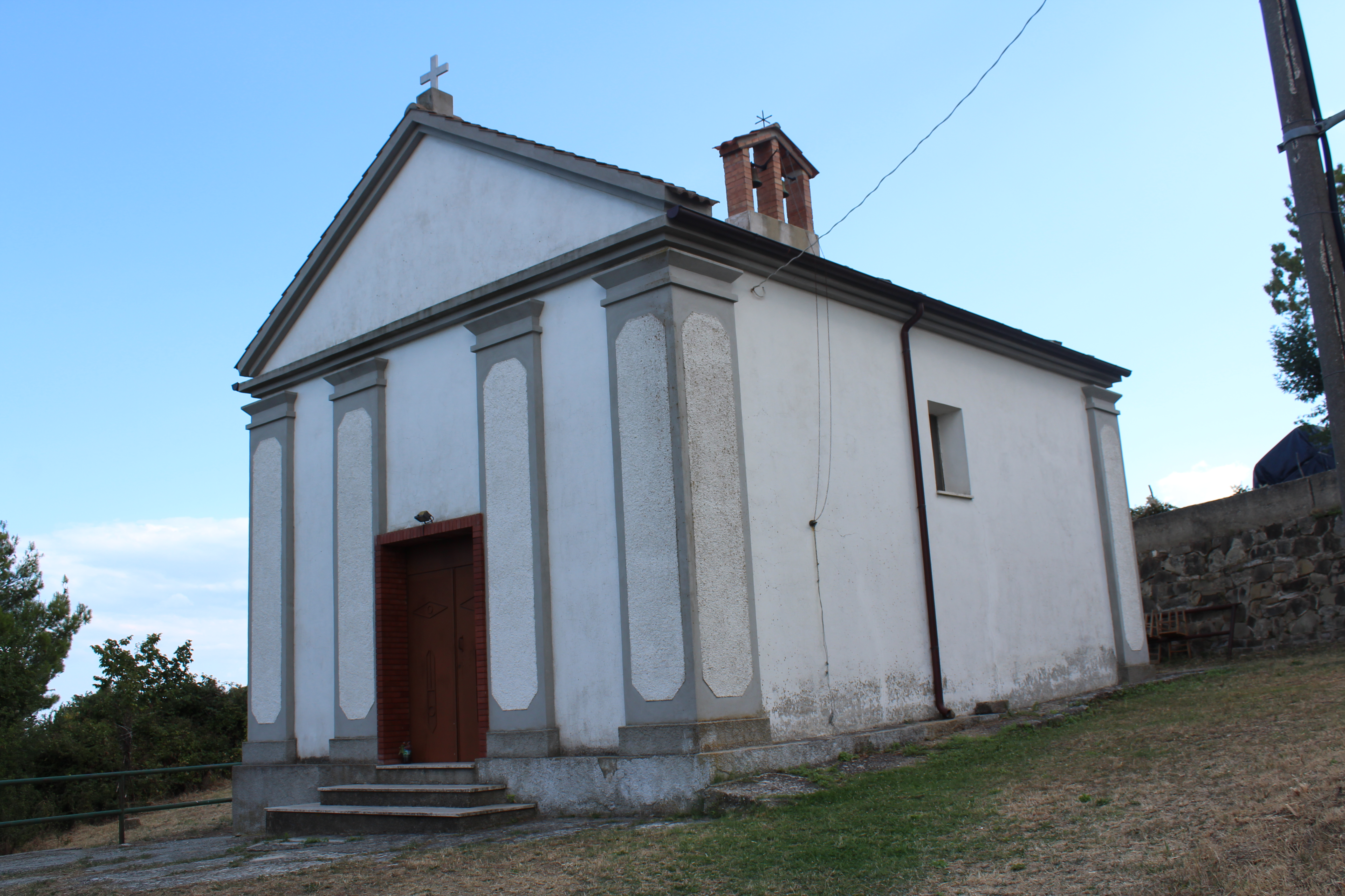 Cappella della Pietà (Albidona)